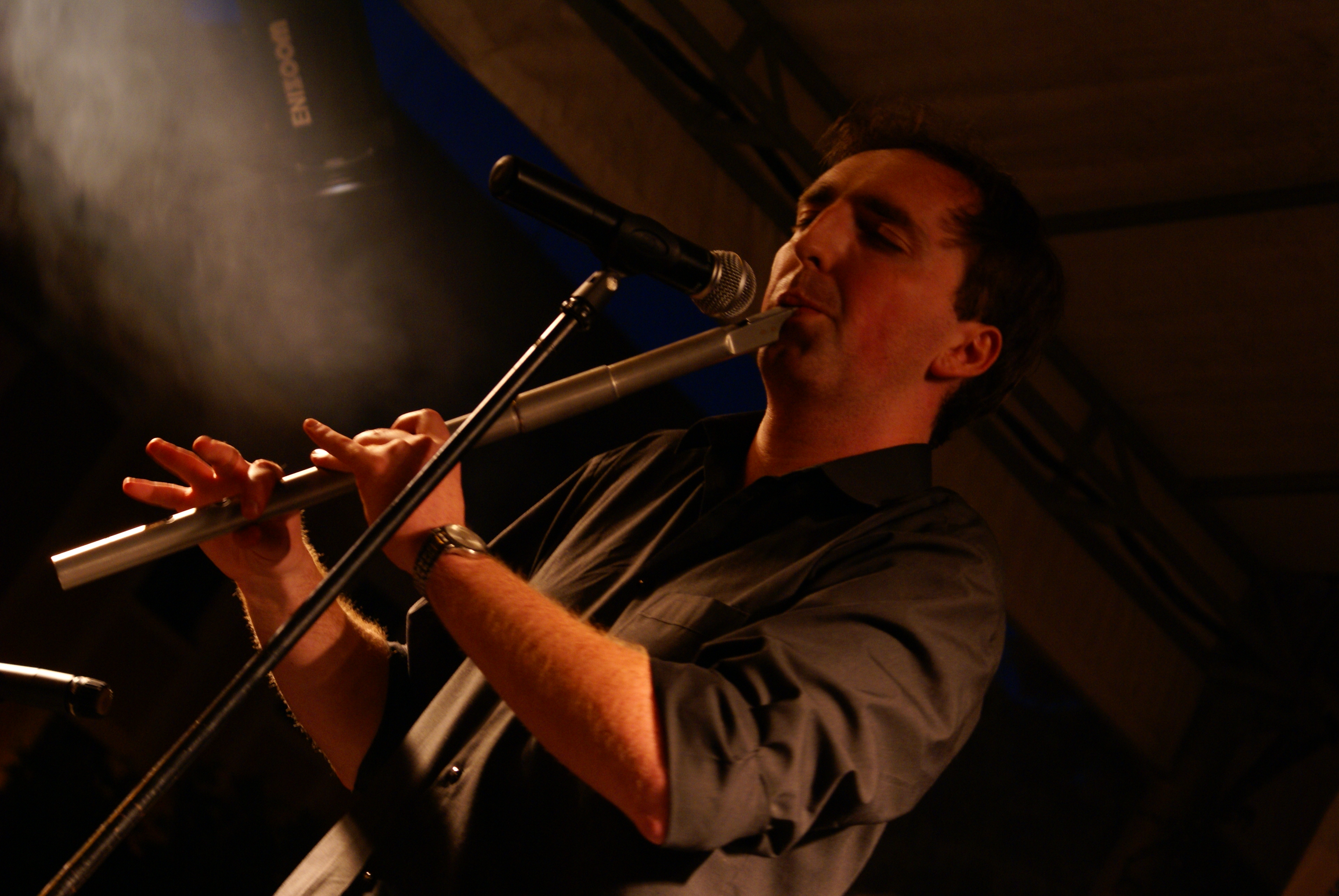 Grzegorz Chudy podczas koncertu Beltaine w Pszczynie.